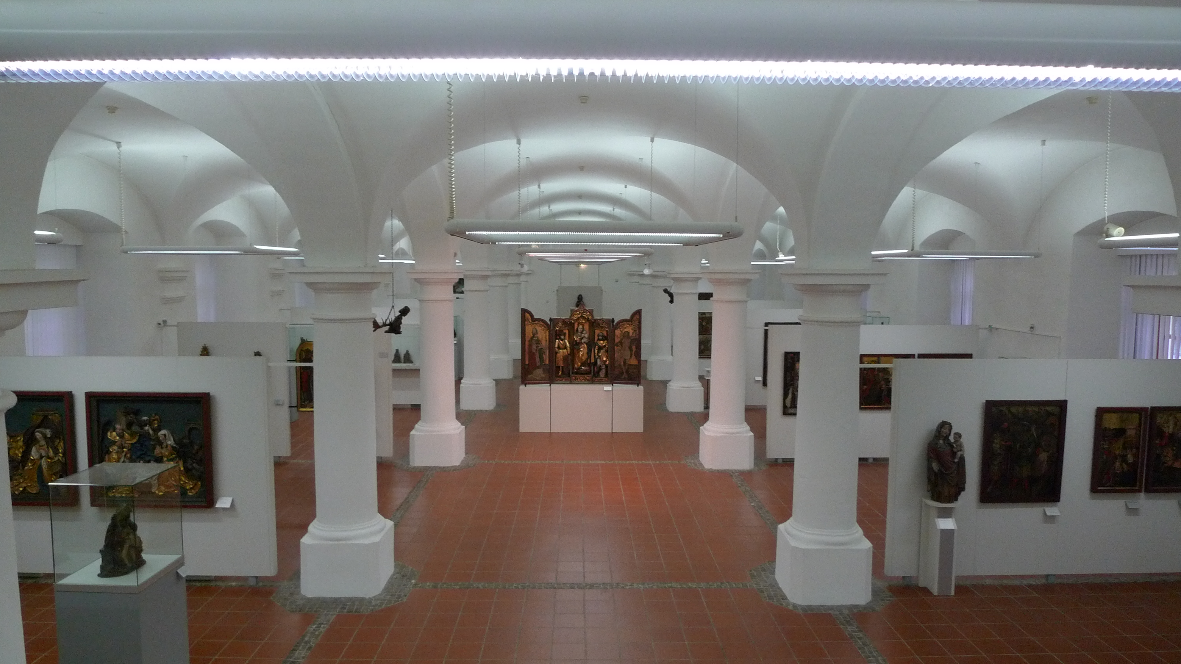 Hauptsaal